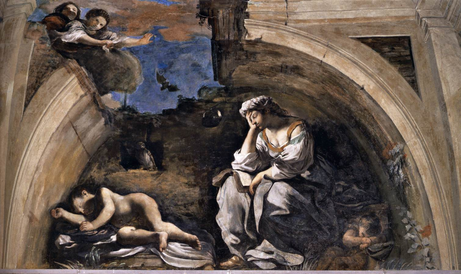 La Notte, tempera, Casino Ludovisi, Roma